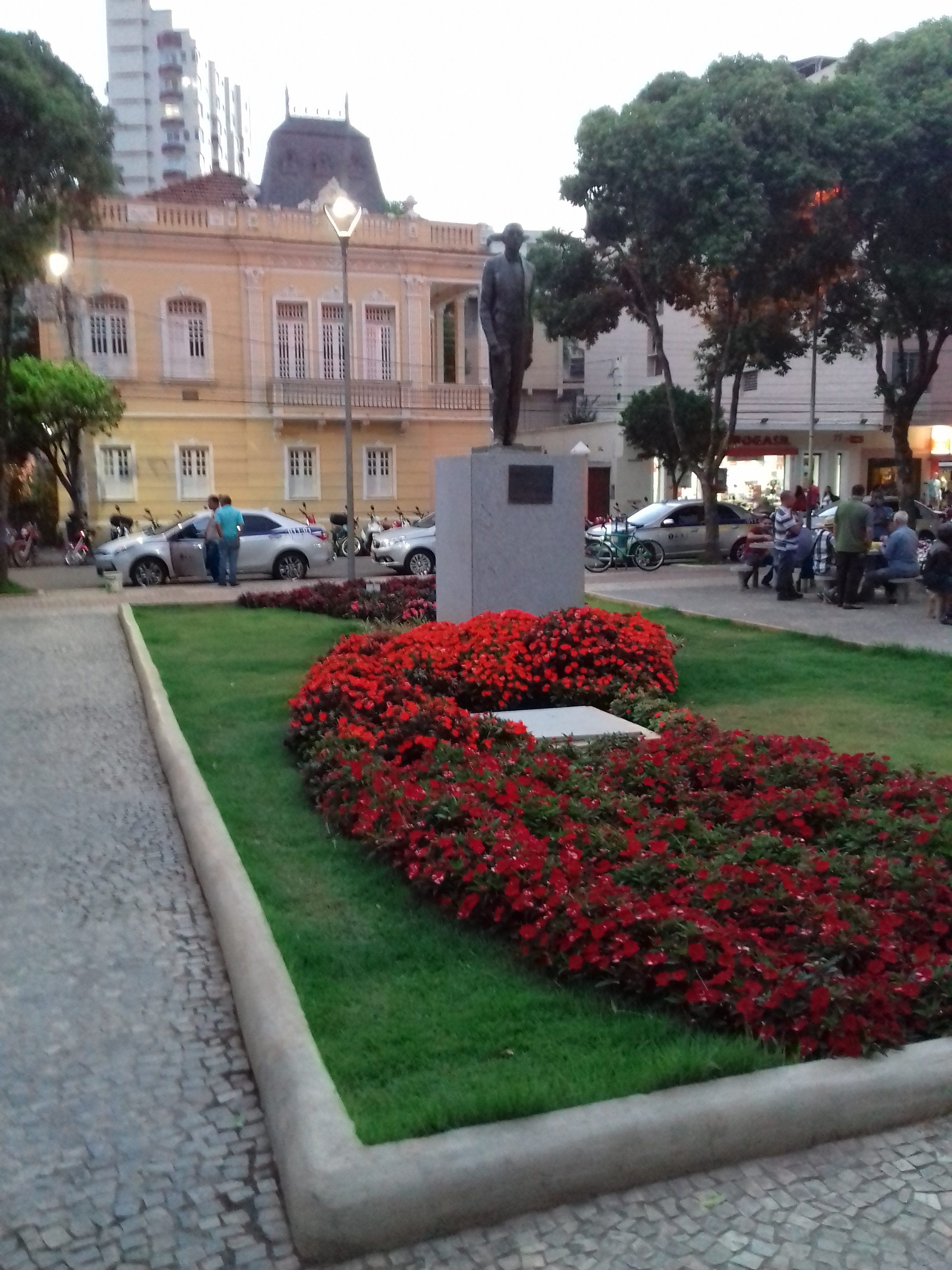 Praça Siviano Brandão, detalhe da estátua de Arthur Bernades